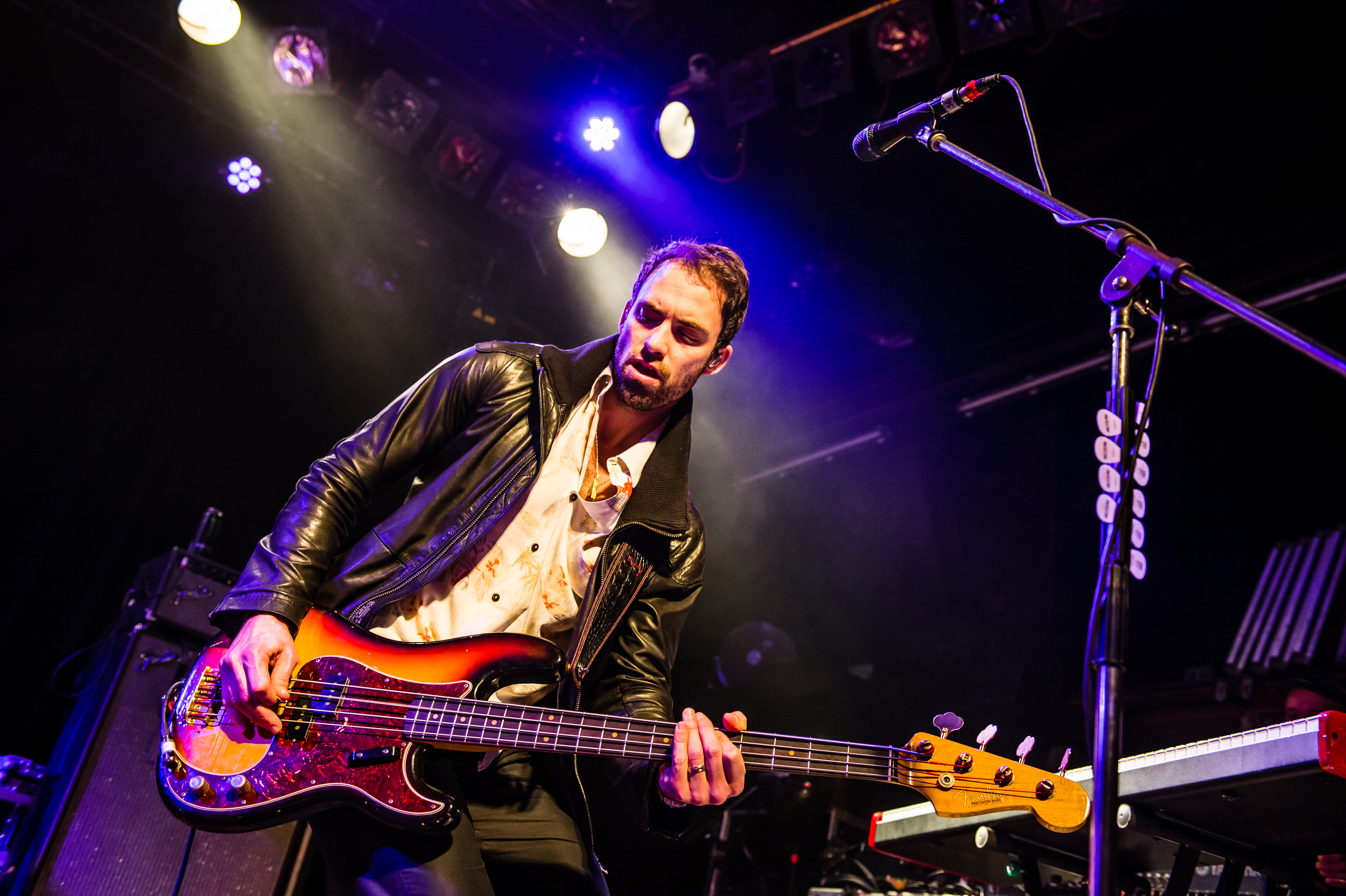 'Halestorm Into the Wild Life Tour - Bochum Zeche'